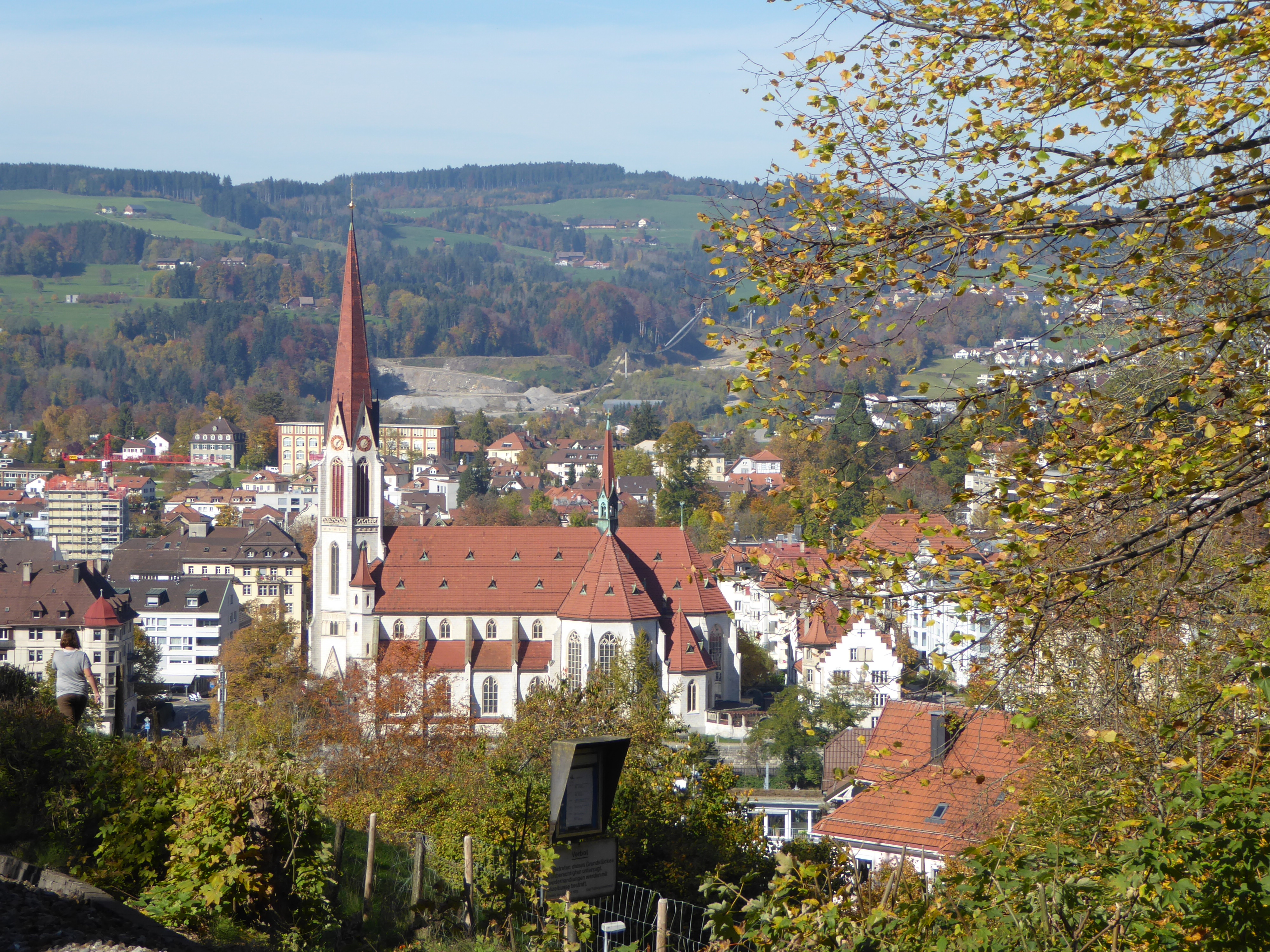 Pfarrkirche St. Otmar (St. Gallen), fotografiert von Riethüsli